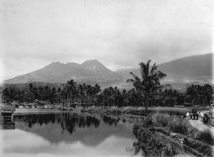 Foto. Lansekap Cipanas, Tarogong, Garut, Jawa Barat.